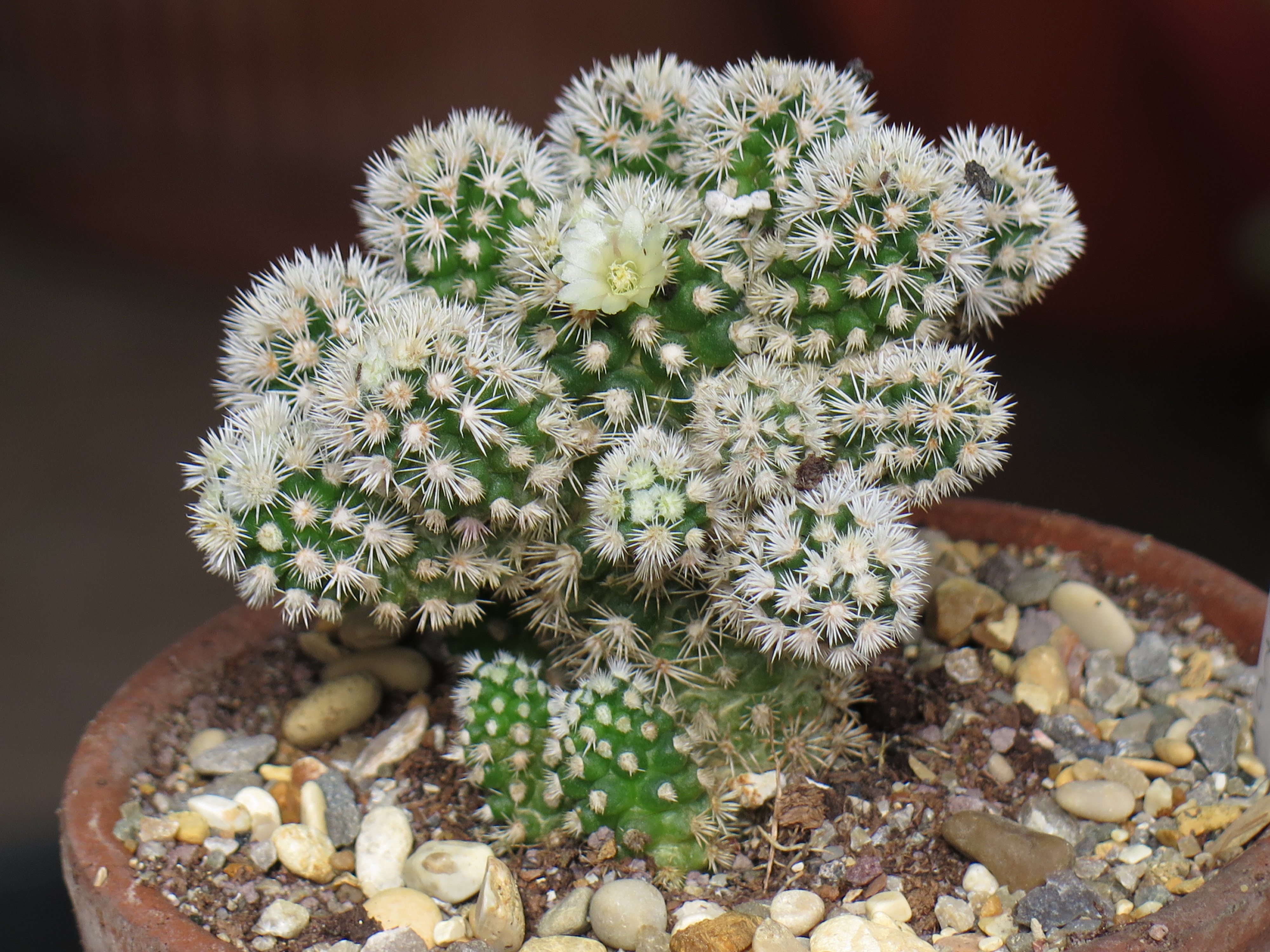 Mammillaria vetula ssp. gracilis cv. Arizona snowcap con fiore